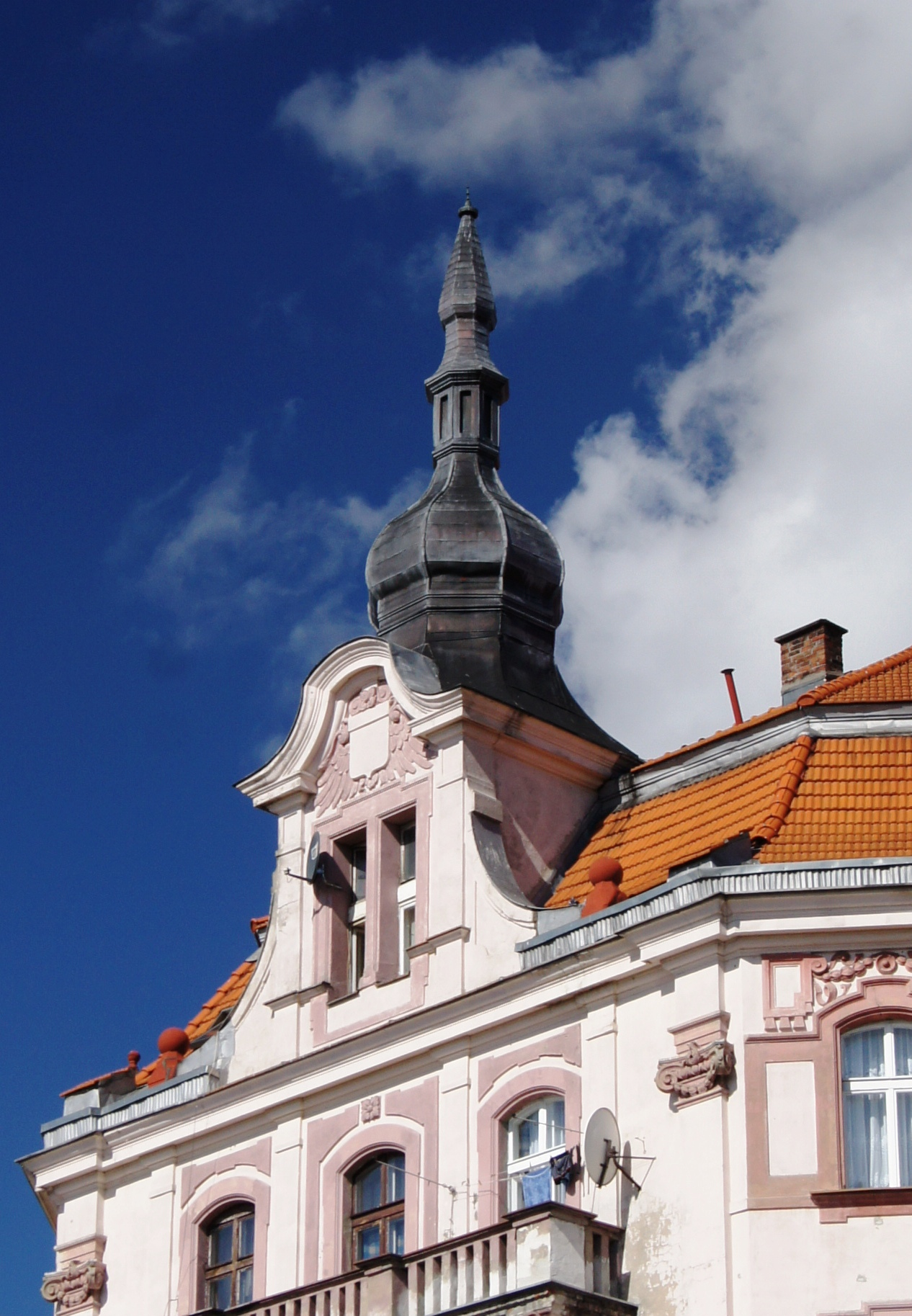 Toruń, ul. Warszawska 2 - kamienica, 1896-98 (zabytek nr A/1557 z 26.04.2010)